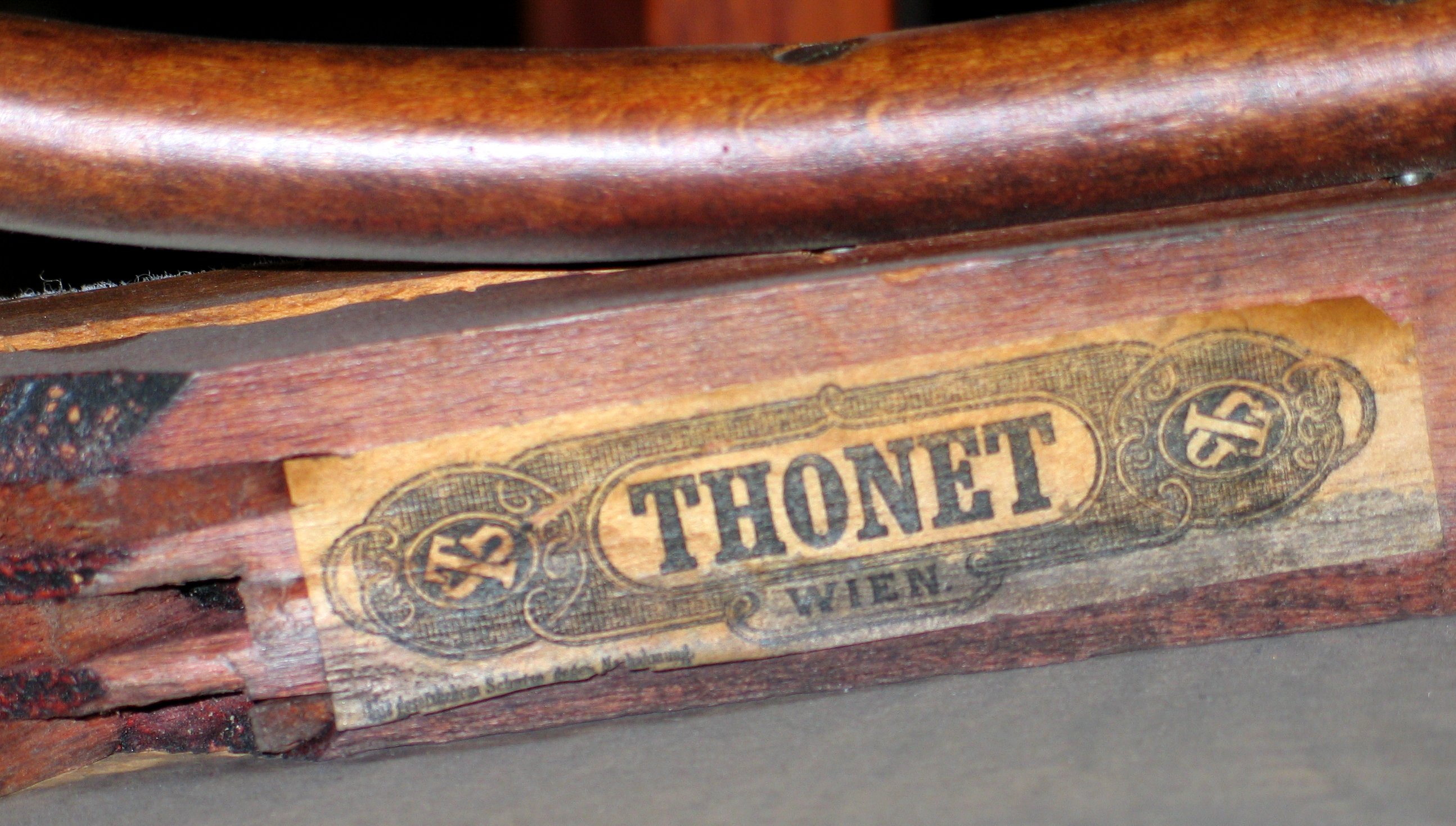 Papieraufkleber unter einem Stuhl der Firma Gebrüder Thonet im Neuen Rathaus von Hannover ...